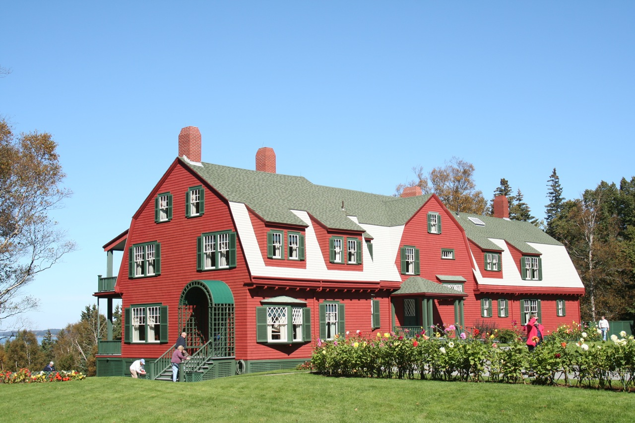 Haus der Familie Roosevelt auf Campobello Island